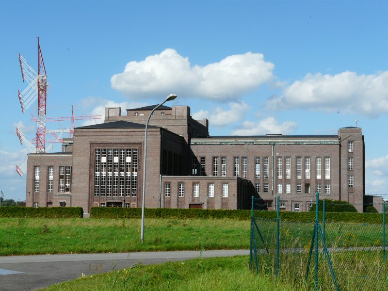 Gebäude Funkamt Nauen in Nauen, Architekt Hermann Muthesius